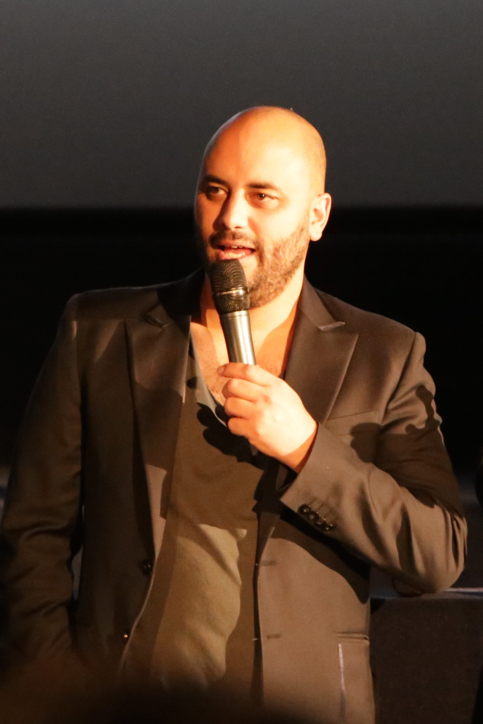 lors de l'avant 1er du film Barbecue